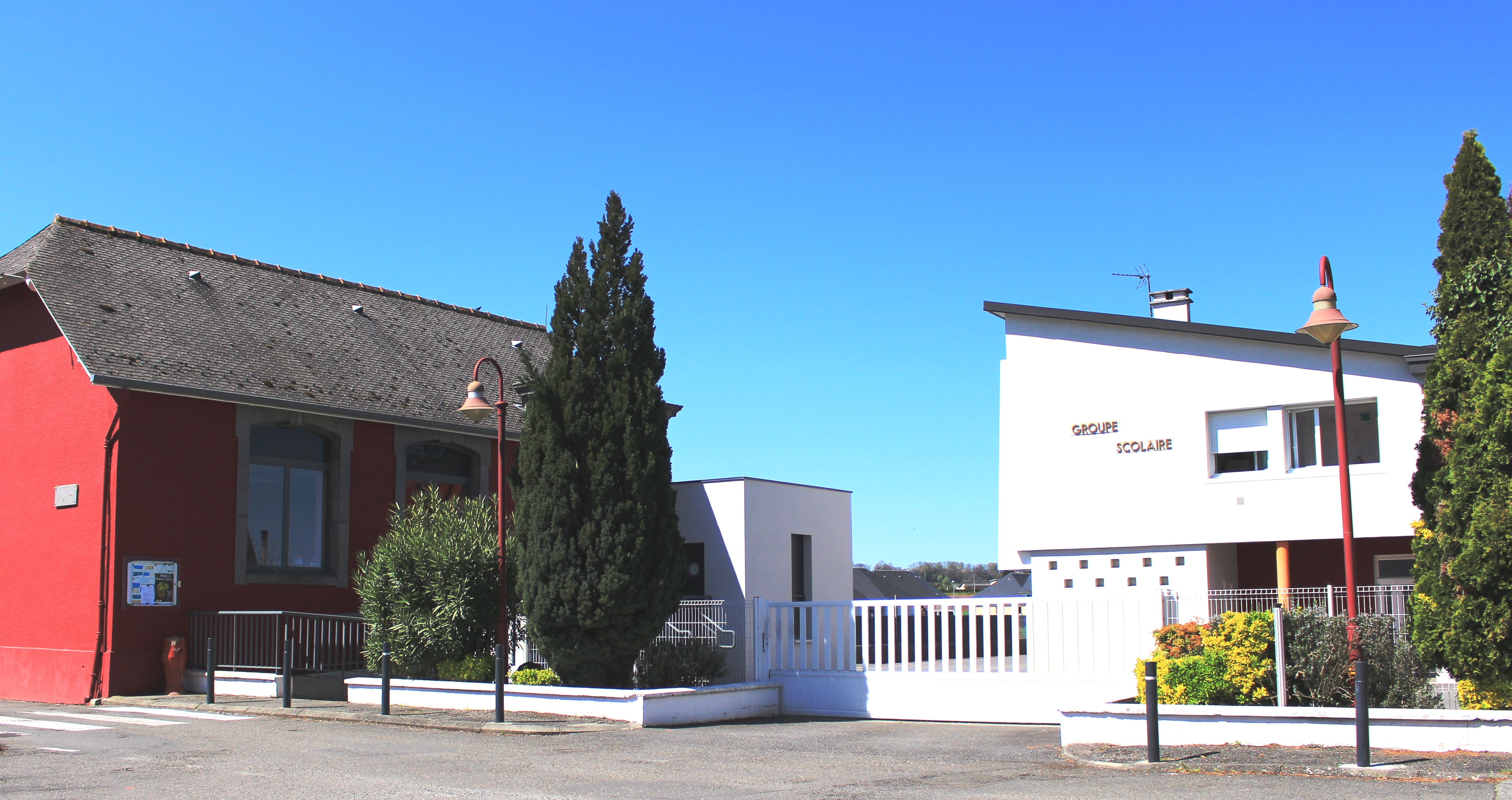 École de Lamarque-Pontacq (Hautes-Pyrénées)